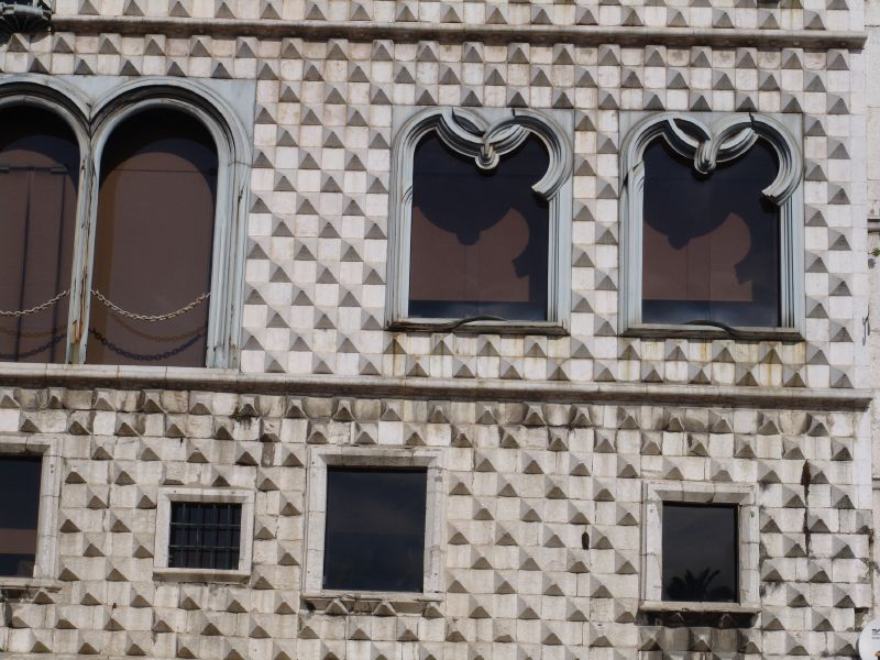 Pormenor da Casa dos Bicos - Lisboa: Foto de Carlos Botelho